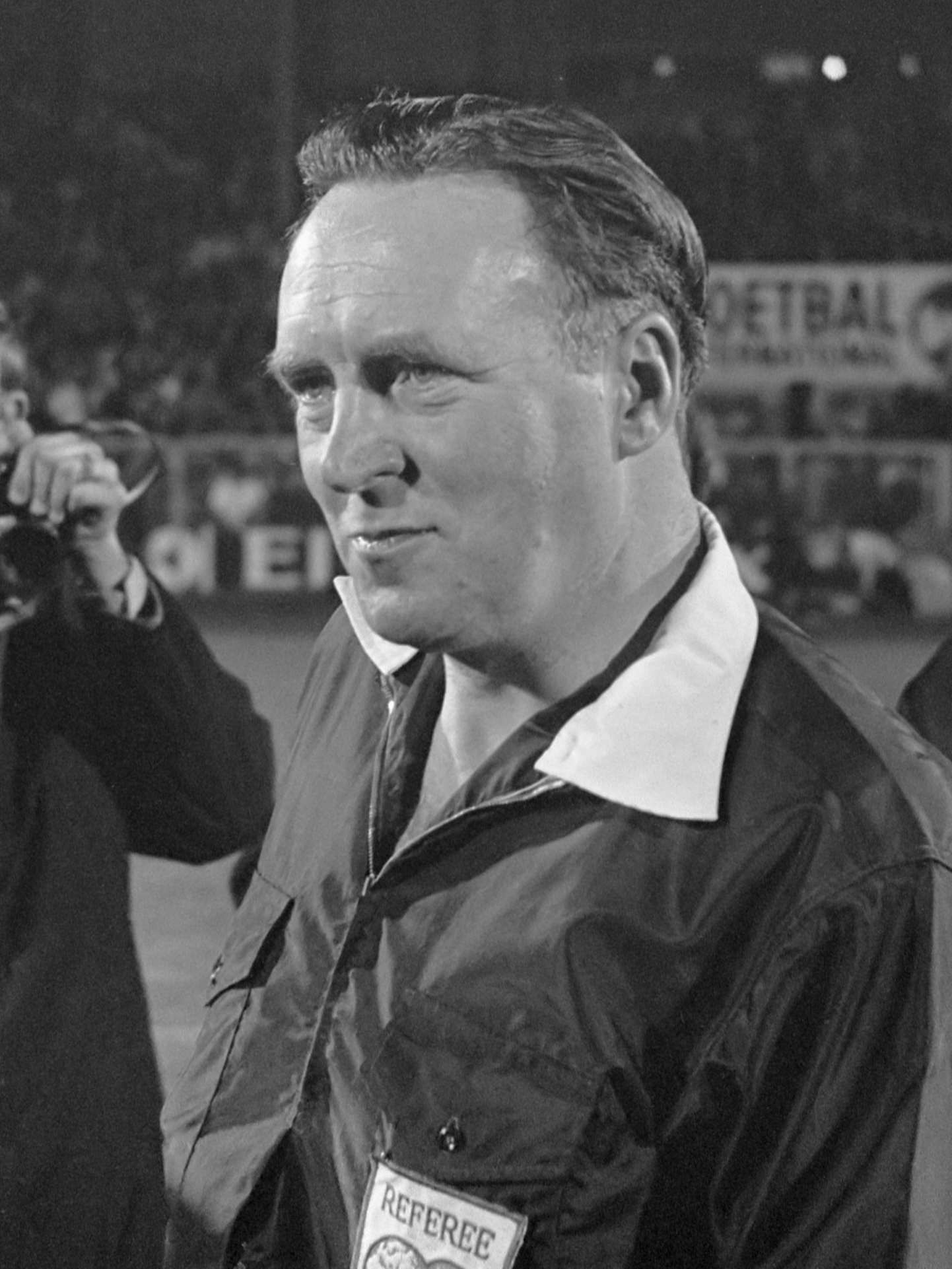 Ajax tegen Spartak 3-0, halve finale Europa Cup nr. 3 , 4: scheidsrechter Jennings (rechts), nr. 5 , 6: aanvoerder Bals (rechts) en Jarabek (links) 13 april 1969